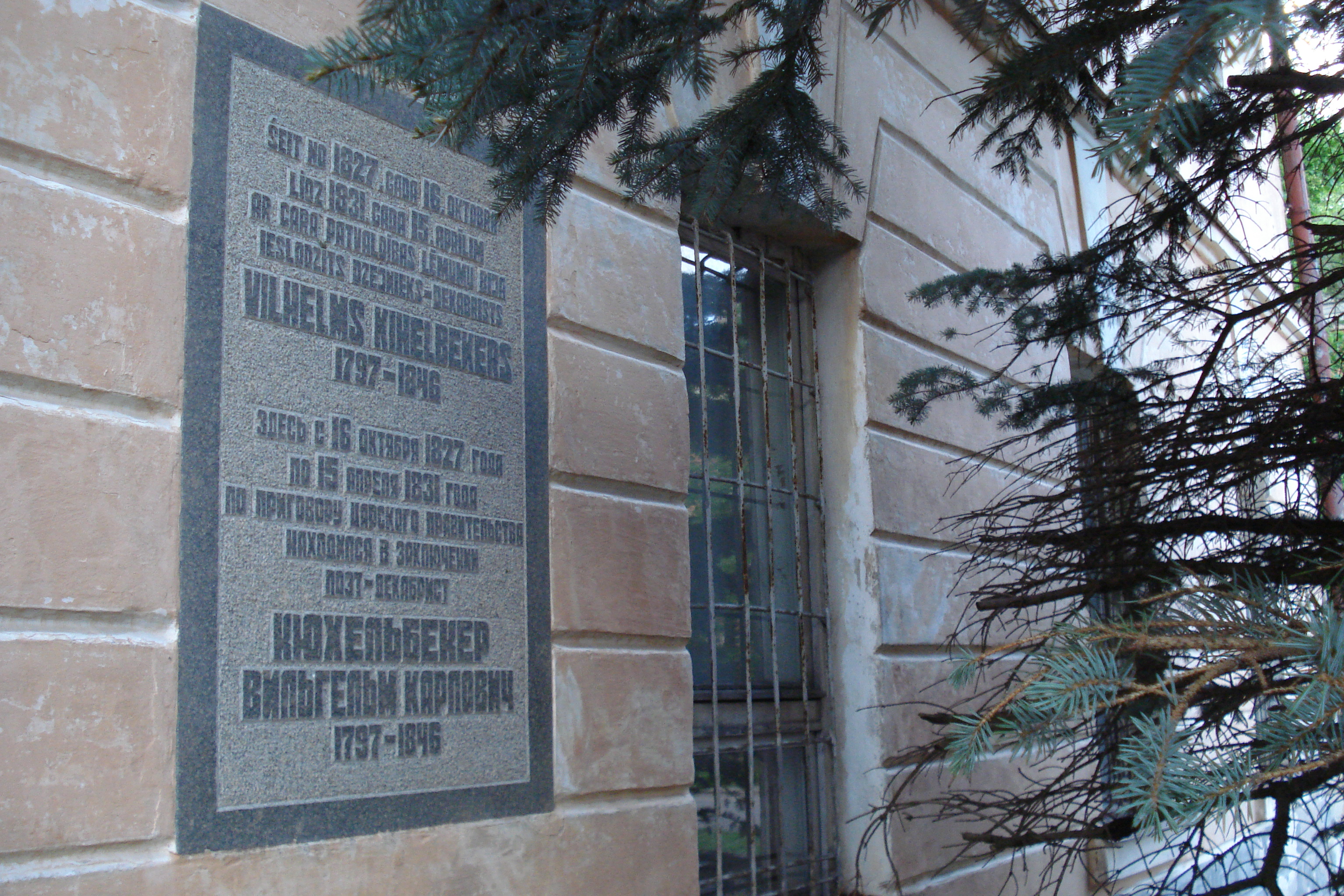 Plaque in memory of Wilhelm Küchelbecker (Вильге́льм Ка́рлович Кюхельбе́кер, 1797-1846), Russian Romantic poet and Decembrist, in the Daugavpils fortress. Мемориальная таблица в память Вильгельма Кюхельбекера, содержавшегося в Динабургской крепости в 1827-1831 годах